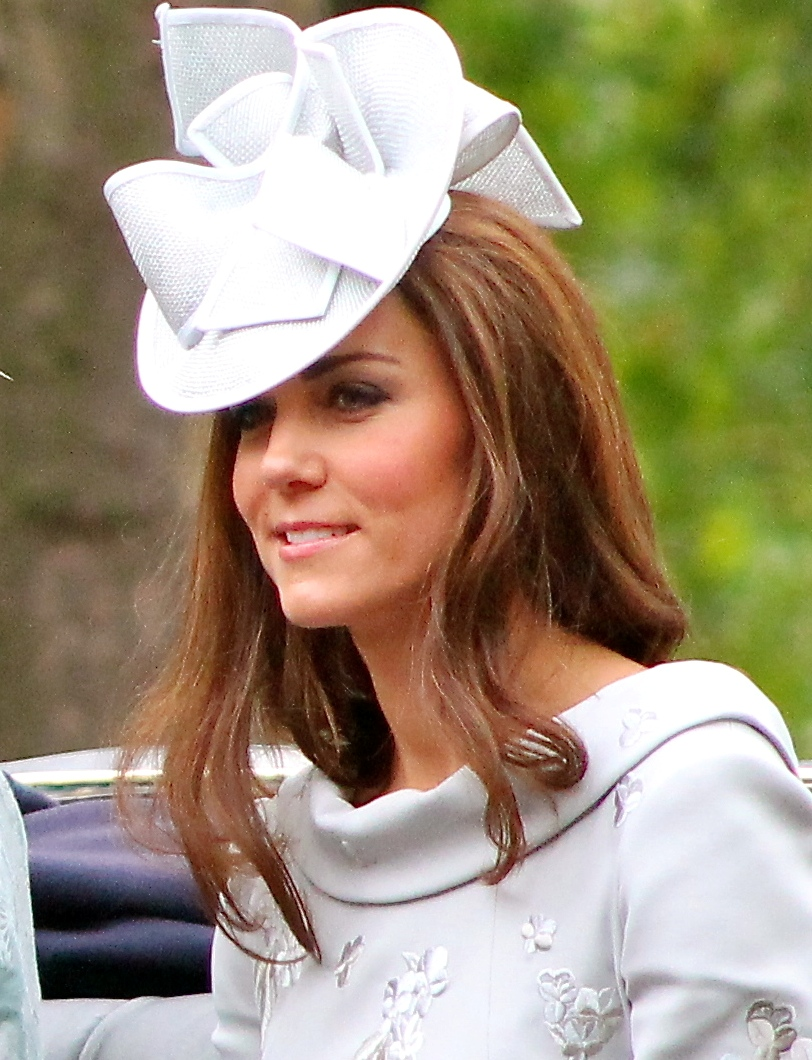 Catherine Middleton, duchesse de Cambridge en 2012